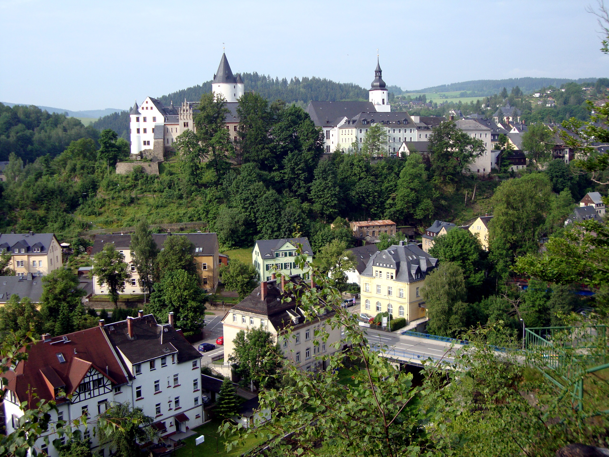 Schwarzenberg/Erzgeb. mit Schloss Schwarzenberg und St.-Georgen-Kirche